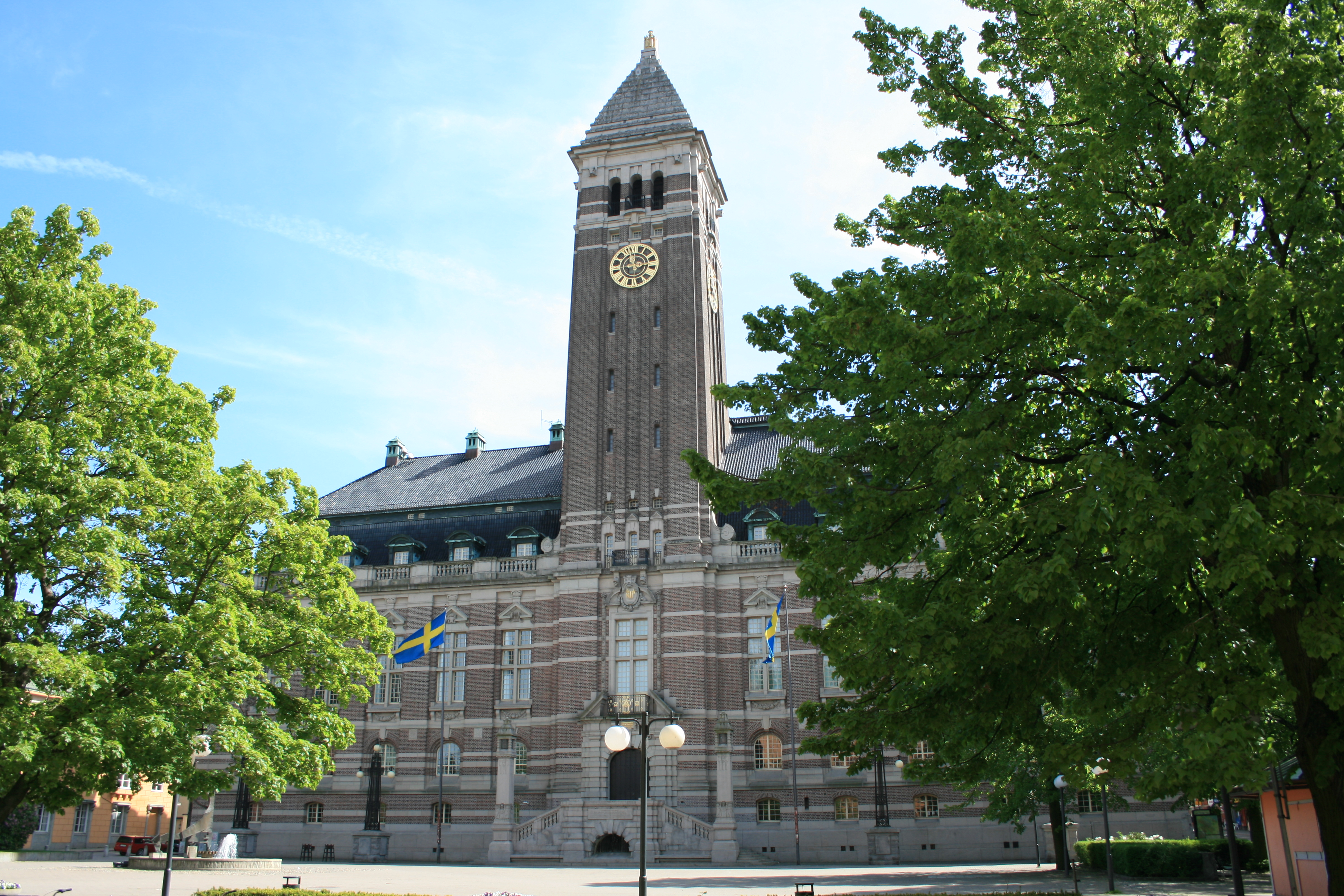 Norrköpings rådhus